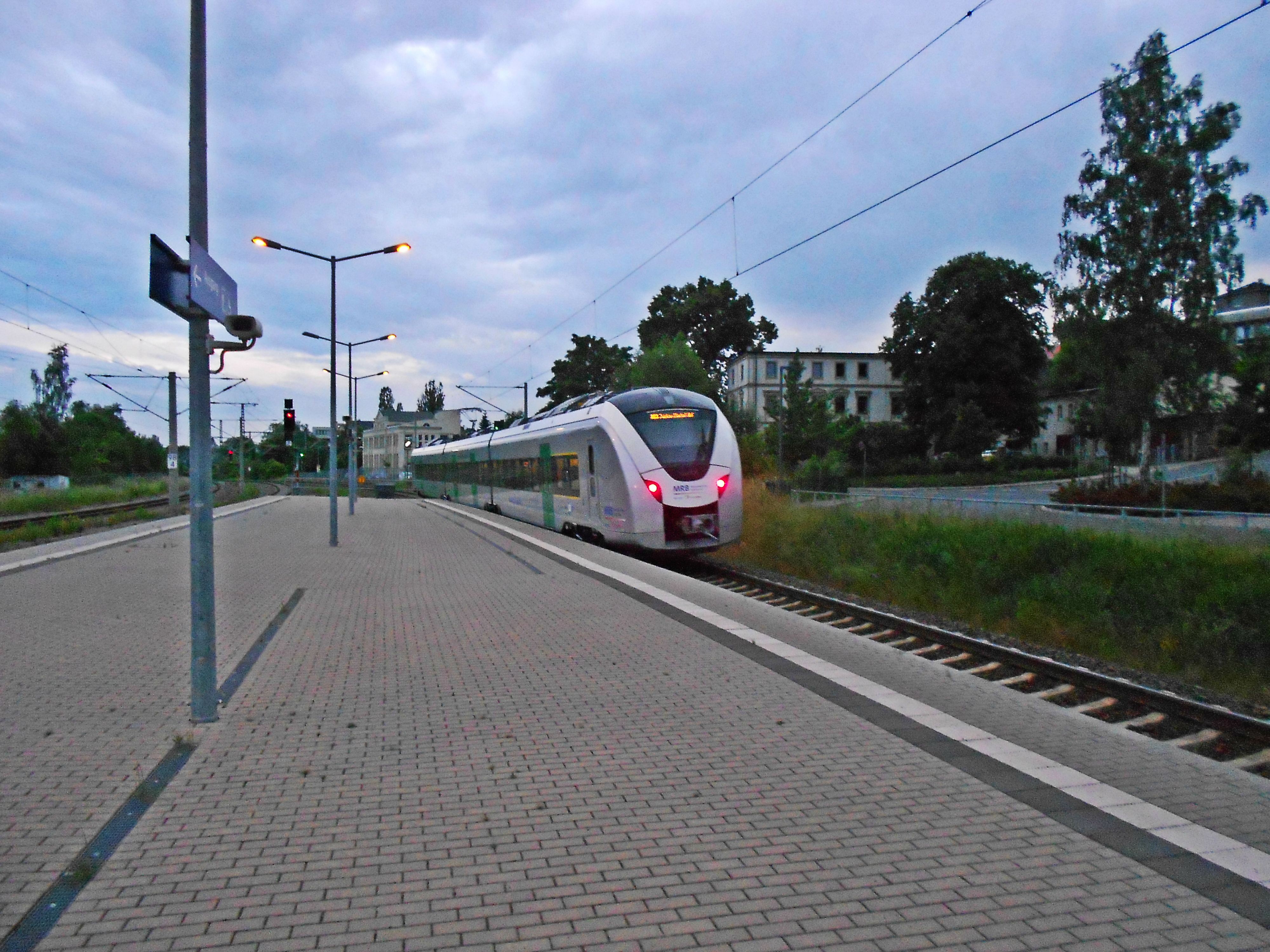 BR 1440 im Bf Hohenstein-Ernstthal (DHO)